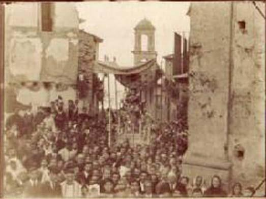 La statua di Maria Santissima del Carmelo, portata in processione a Palmi, in una fotografia risalente al 1894.